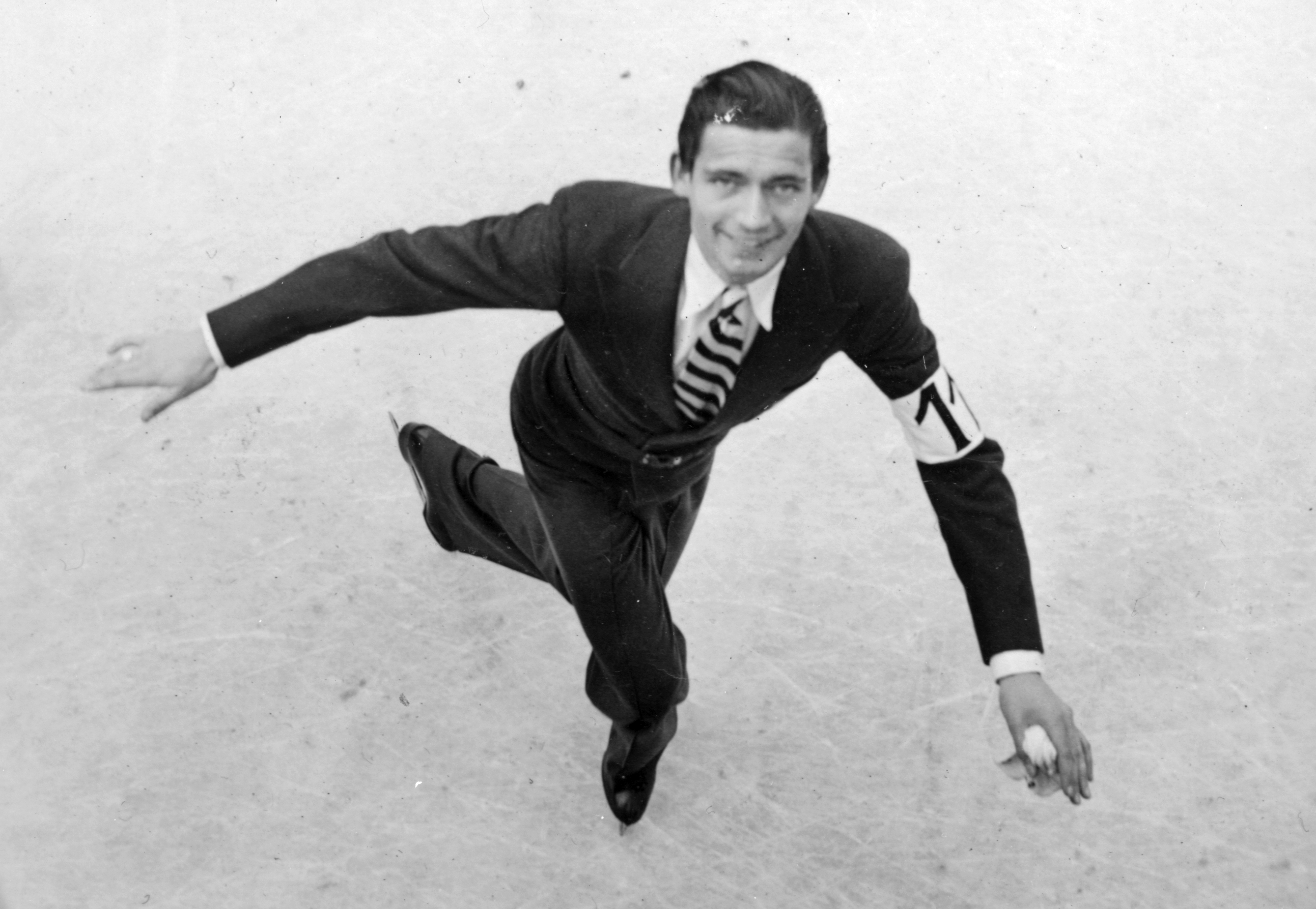 Király Ede, minden idők legeredményesebb magyar műkorcsolyázója. Location: Hungary Title: Király Ede, minden idők legeredményesebb magyar műkorcsolyázója.